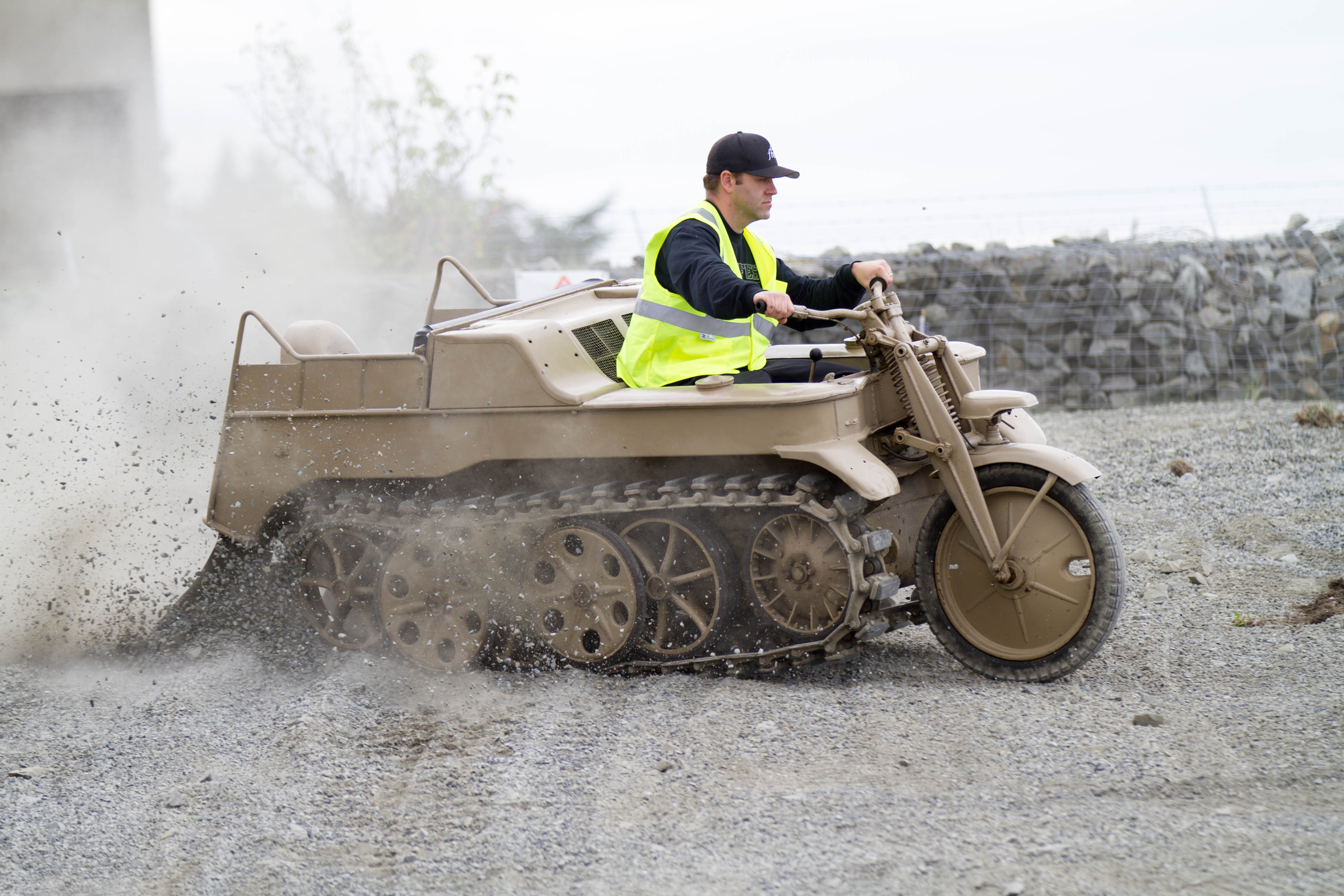 TankFest 2015-33